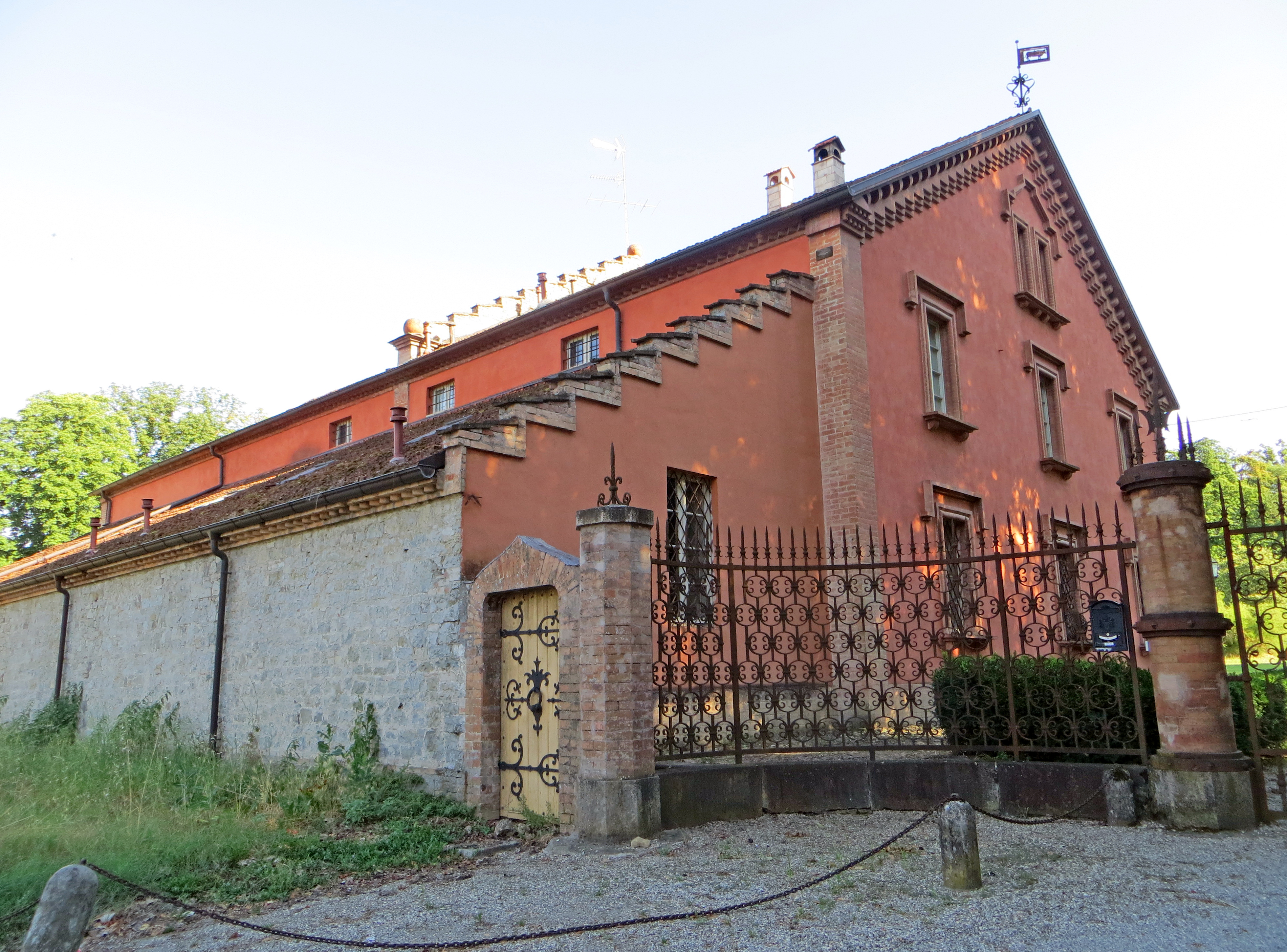 Villa Caumont Caimi (Felino) - stalla